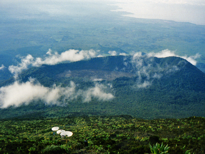 Mount Nyiragongo , DR Congo.